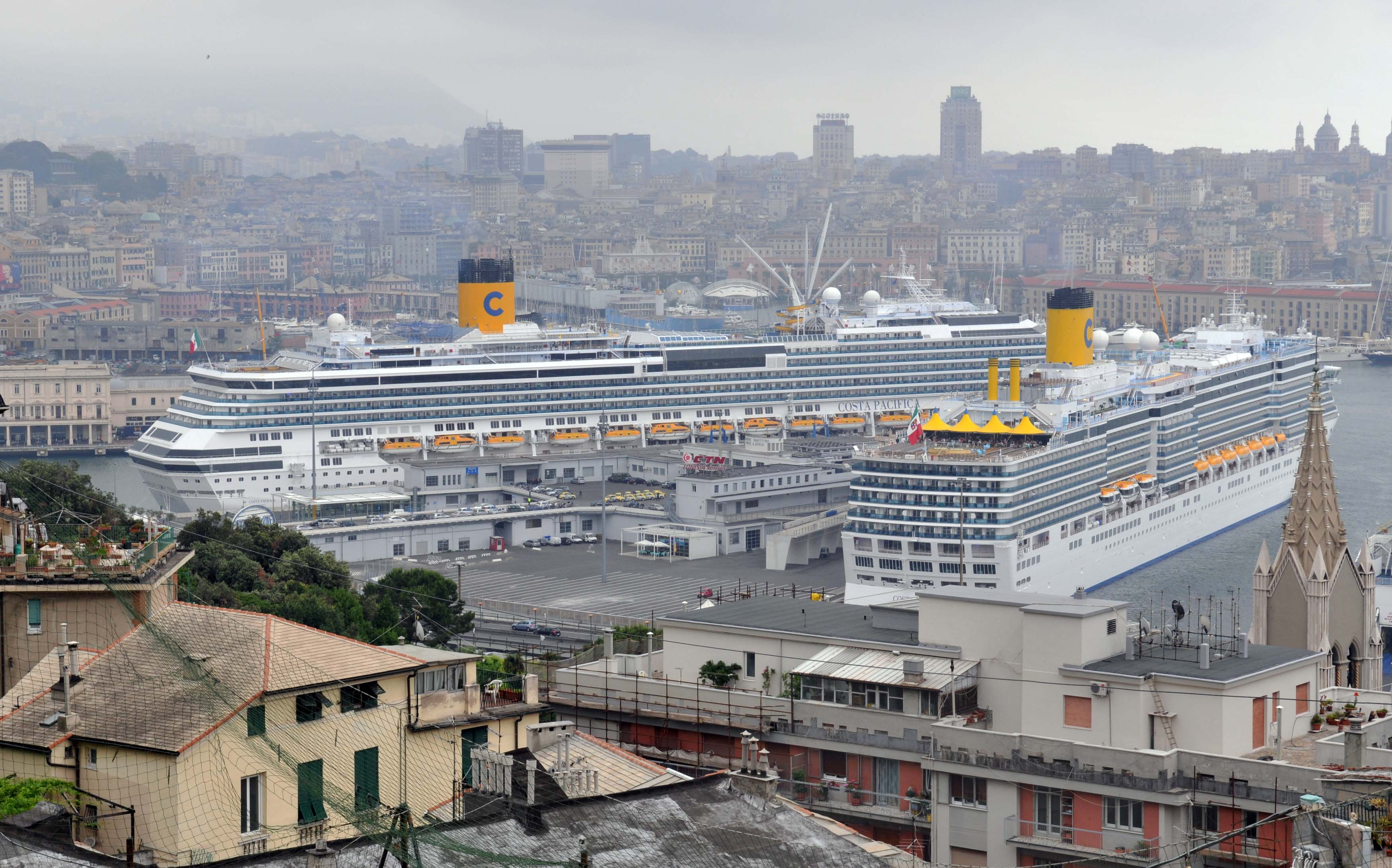 Costa Luminosa e Costa Pacifica il giorno del loro doppio Battesimo